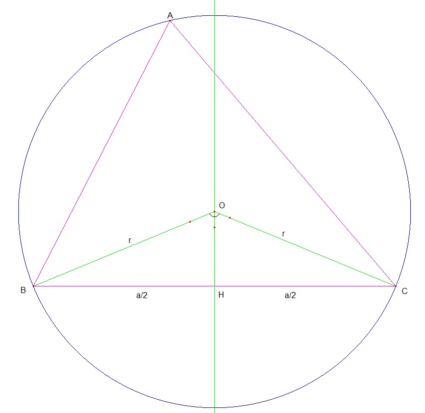 Sinüs Teoremi ispatında kullanılan şekil